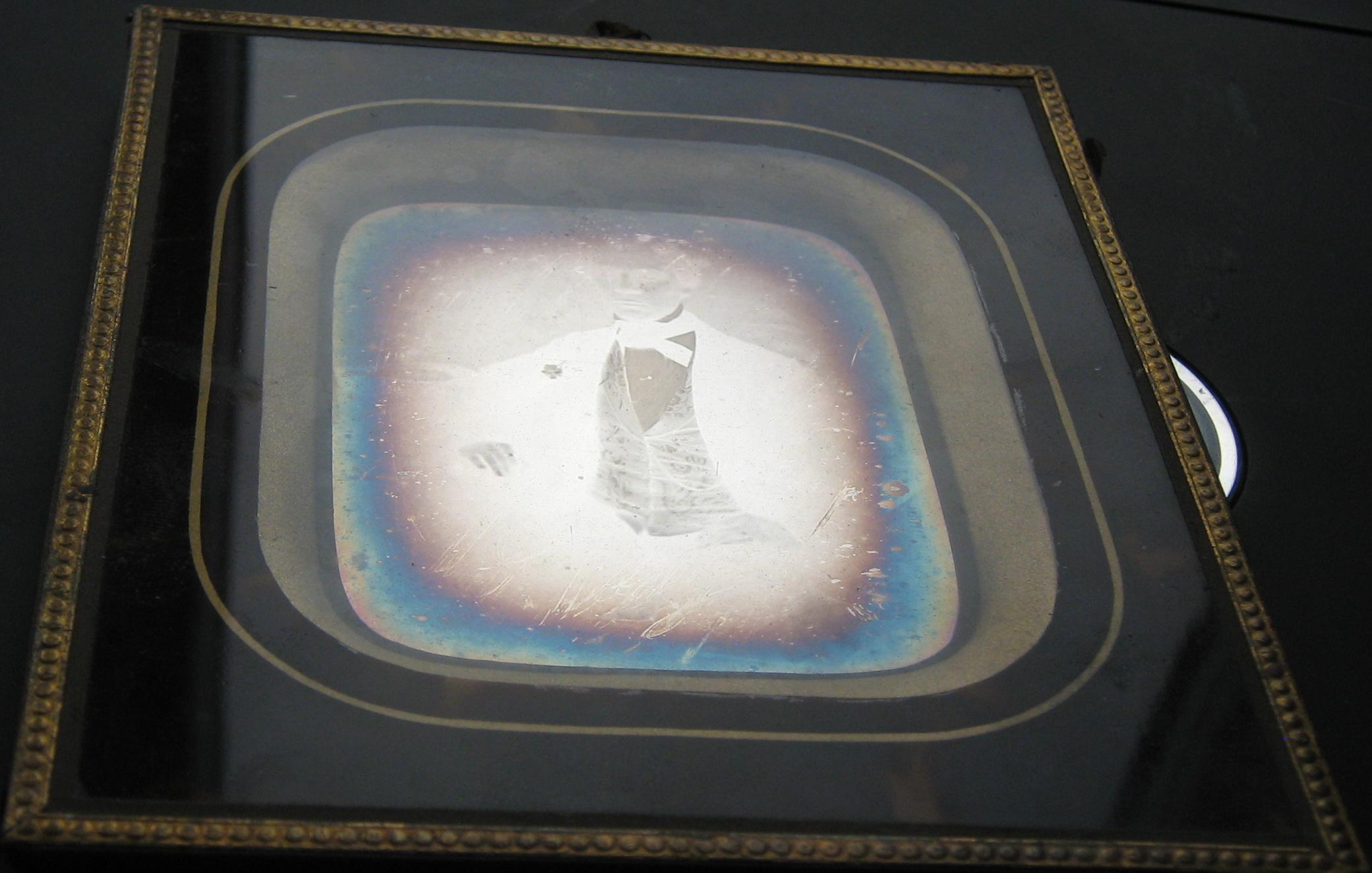 Daguerrotypi, fotograferad i snett infallande ljus för att visa bildernas tendens att bli negativa när ljuset faller in snett i bilden. Man ser också den typiska oxideringen i bildens kanter där syre trängt in i monteringen.